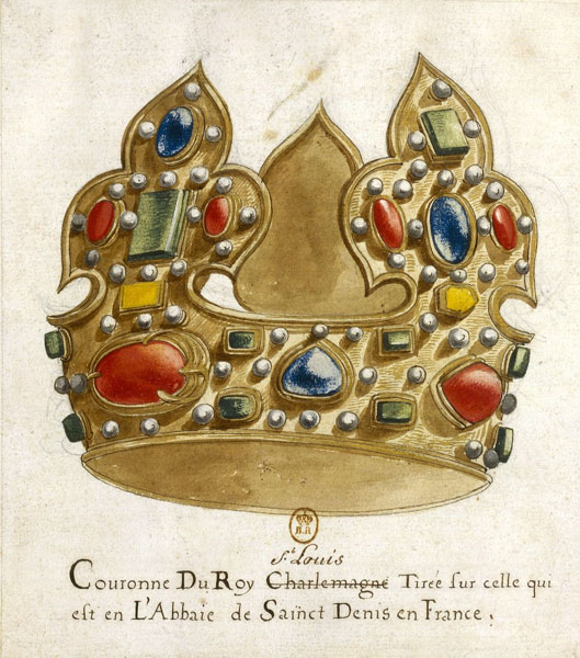 Dessin des régalia conservé dans la collection Gaignières : couronne dite de saint Louis (planche III de l'ouvrage de Dom Félibien elle porte la lettre P).